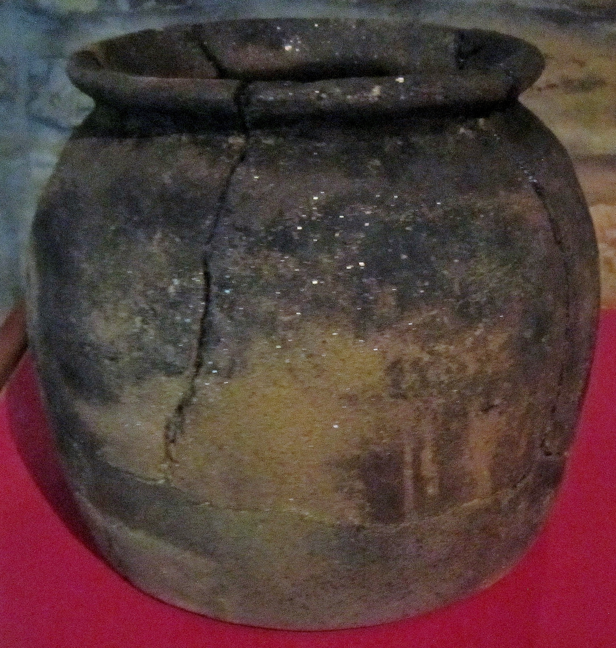 Vase de forme anglo-saxonne, mais de production locale, datant du 7e ou du 8e siècle, trouvé sur le site de Leslouc'h en Plouédern (exposé au musée de l'abbaye de Landévennec lors de l'exposition temporaire "La Bretagne au temps des rois" en 2018).